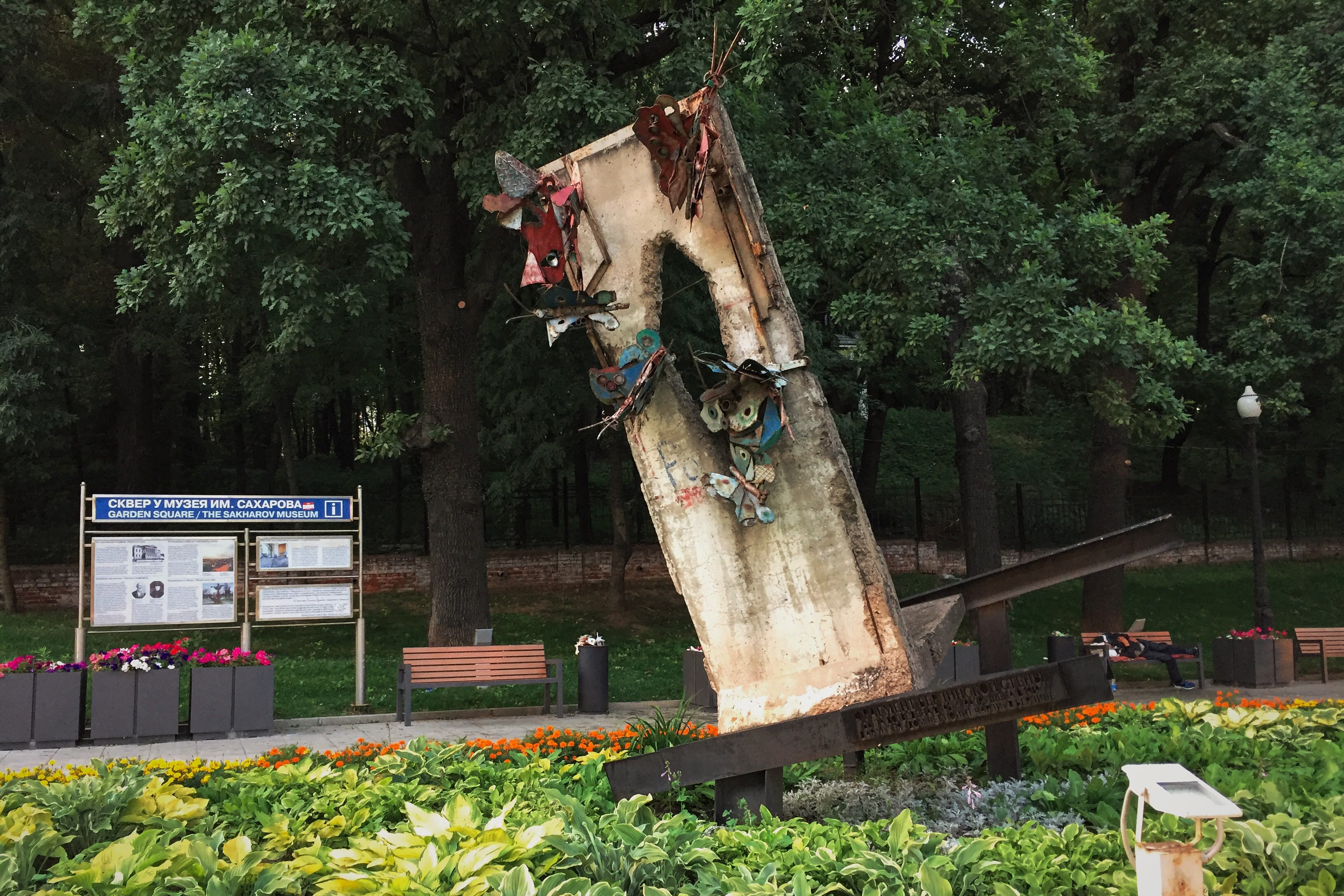 Земляной Вал. Сквер у Сахаровского центра. Фрагмент Берлинской стены